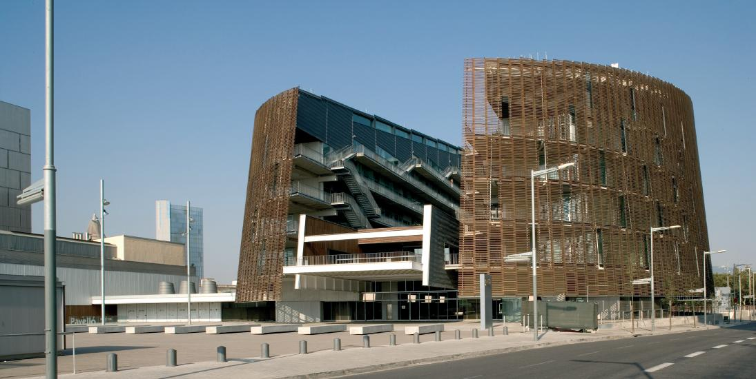 Parc de Recerca Biomèdica de Barcelona